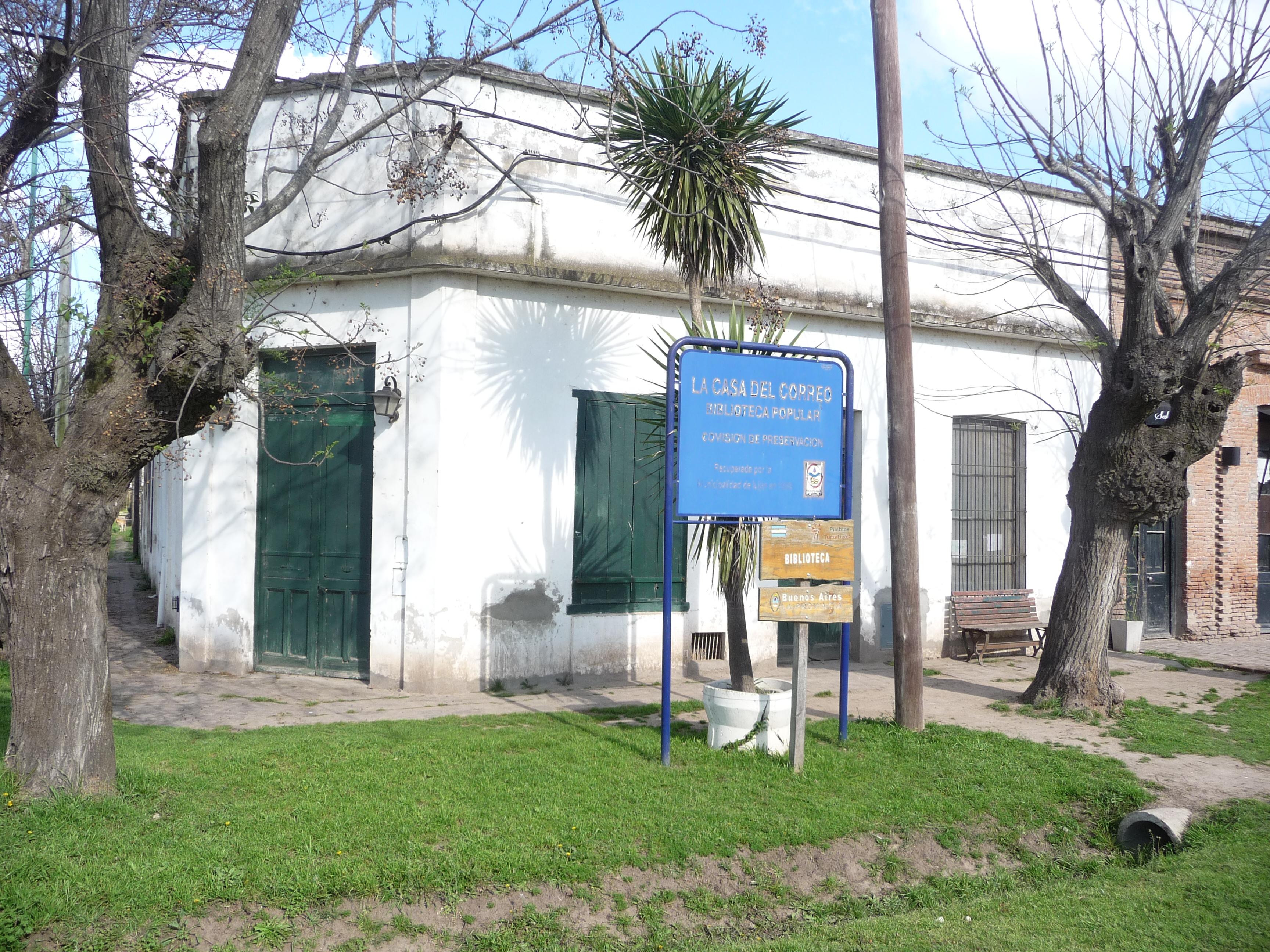 Zona de preservación de Carlos Keen (en su calidad de poblado histórico) biblioteca